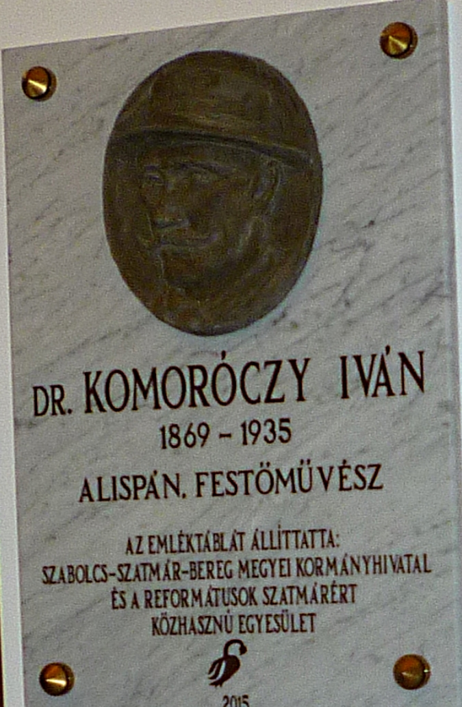 Dr. Komoróczy Iván emléktábla, mely a Mátészalkai Járási Hivatal nagytermének bejárata előtt található meg.